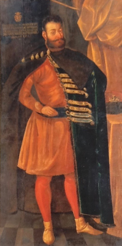 Vizegespan des Komiats Preßburg